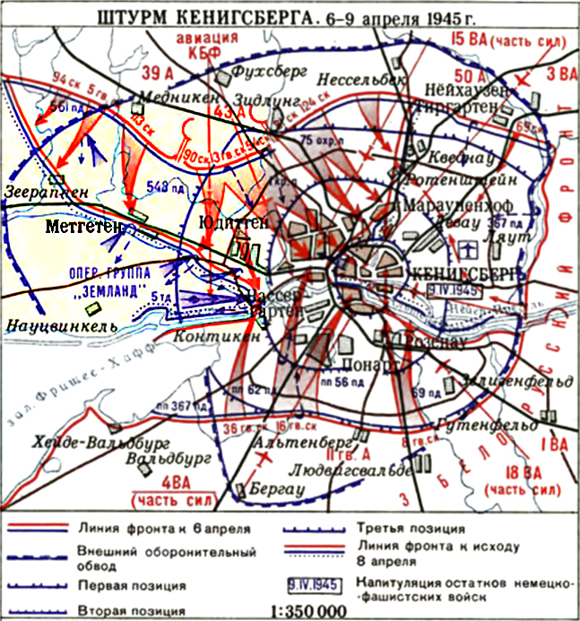 Метгетен у схемі Кенігсбергської операції 1945 року.